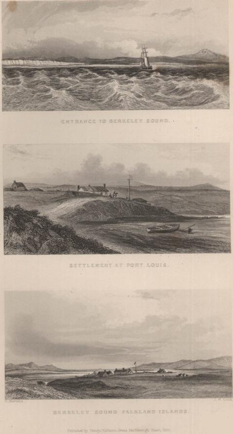 Entrada Bahía de la Anunciación, Malvinas, 1833 en una litografía del libro de Darwin. El dibujante era Conrad Martens.